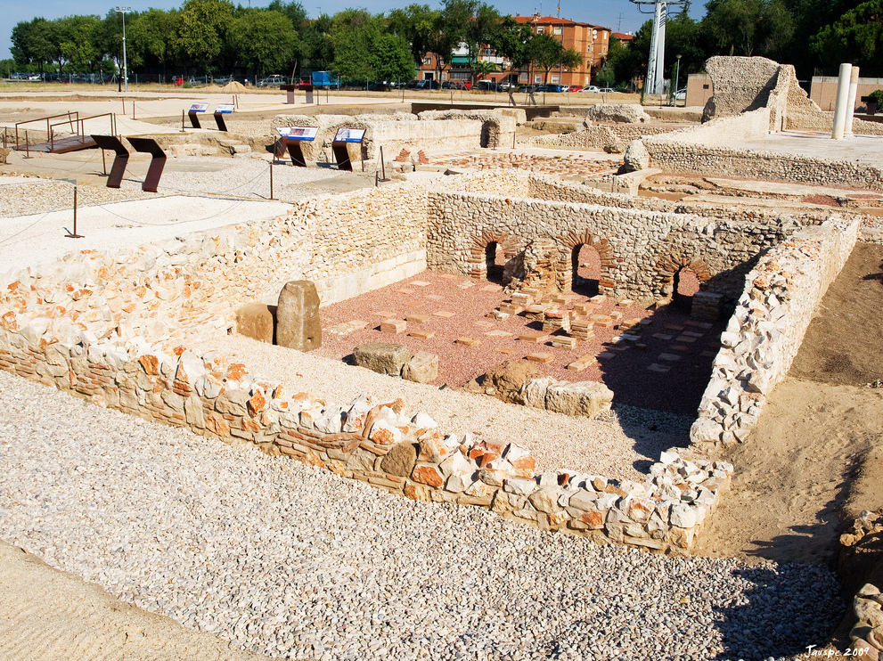 Termas sur (en primer plano) y la basílica (al fondo) de Complutum.